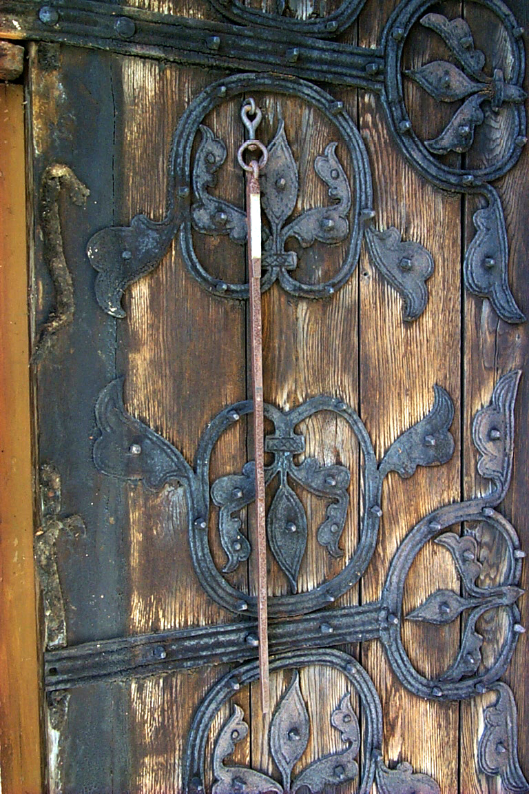 Likaren i Stånga kyrka, Gotland, Sverige.